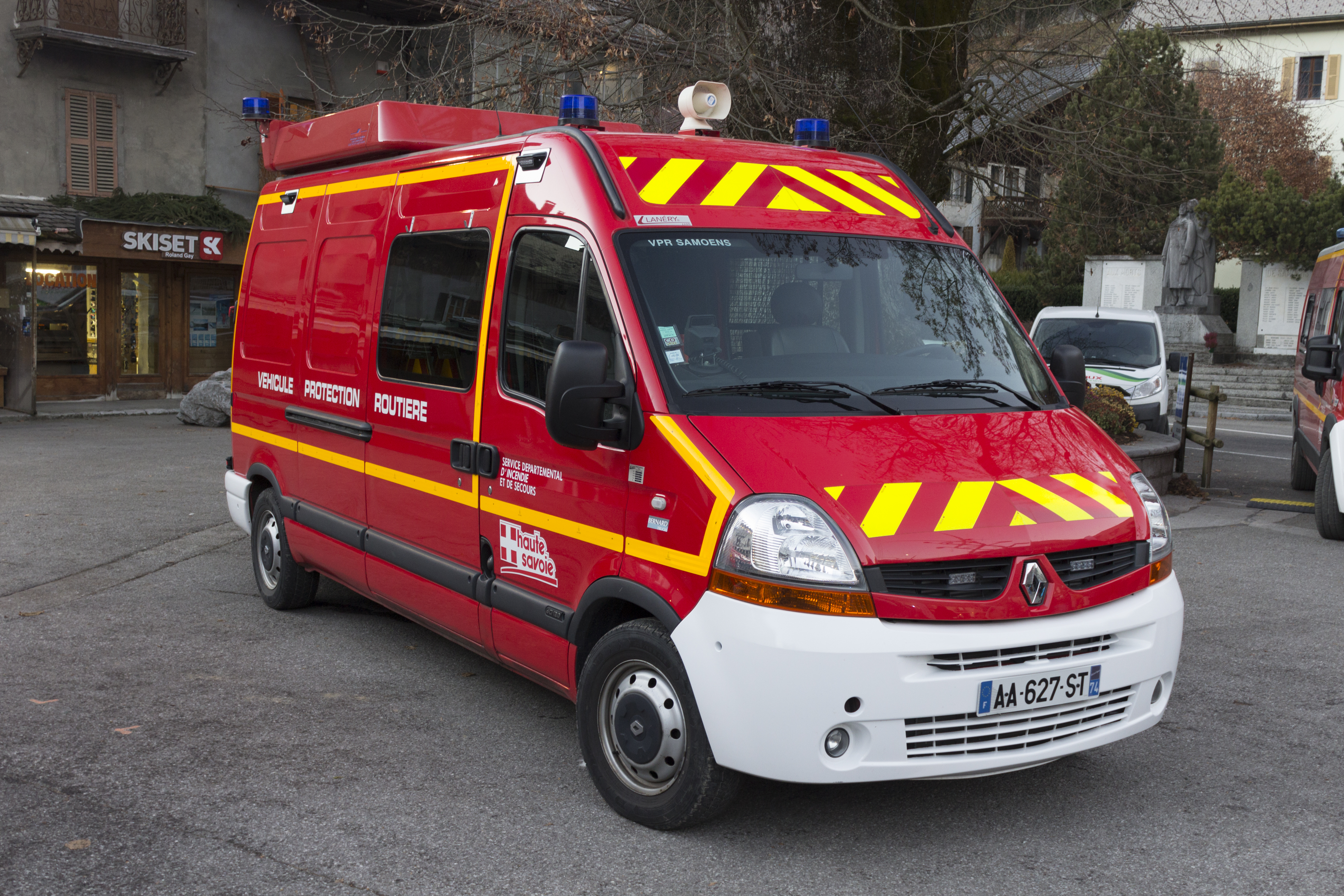 Renault Master II du Service Départemental d'Incendie et de Secours de Haute Savoie.